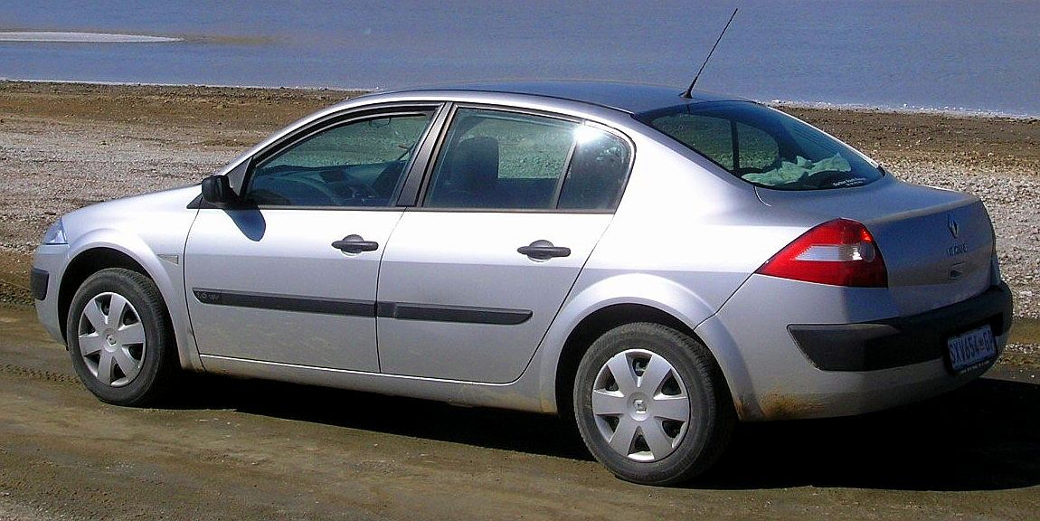 Diaz-Point bei Luderitz